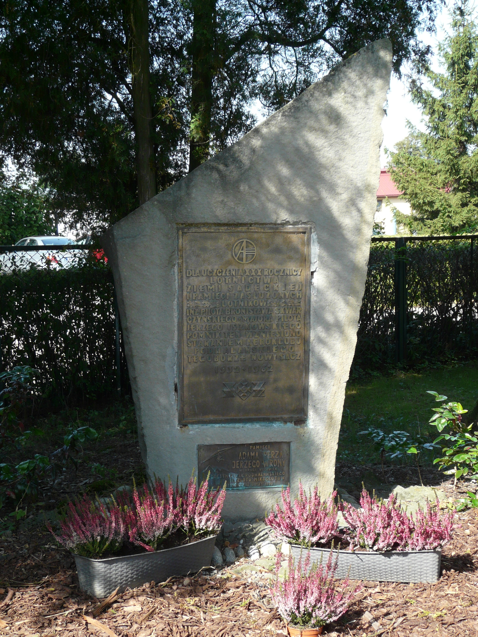 Pomnik na terenie Aeroklubu Podhalańskiego z tablicami upamiętniającymi: Bronisława Skwarczyńskiego i Jerzego Iszkowskiego oraz Adama Perza i Jerzego Wrony